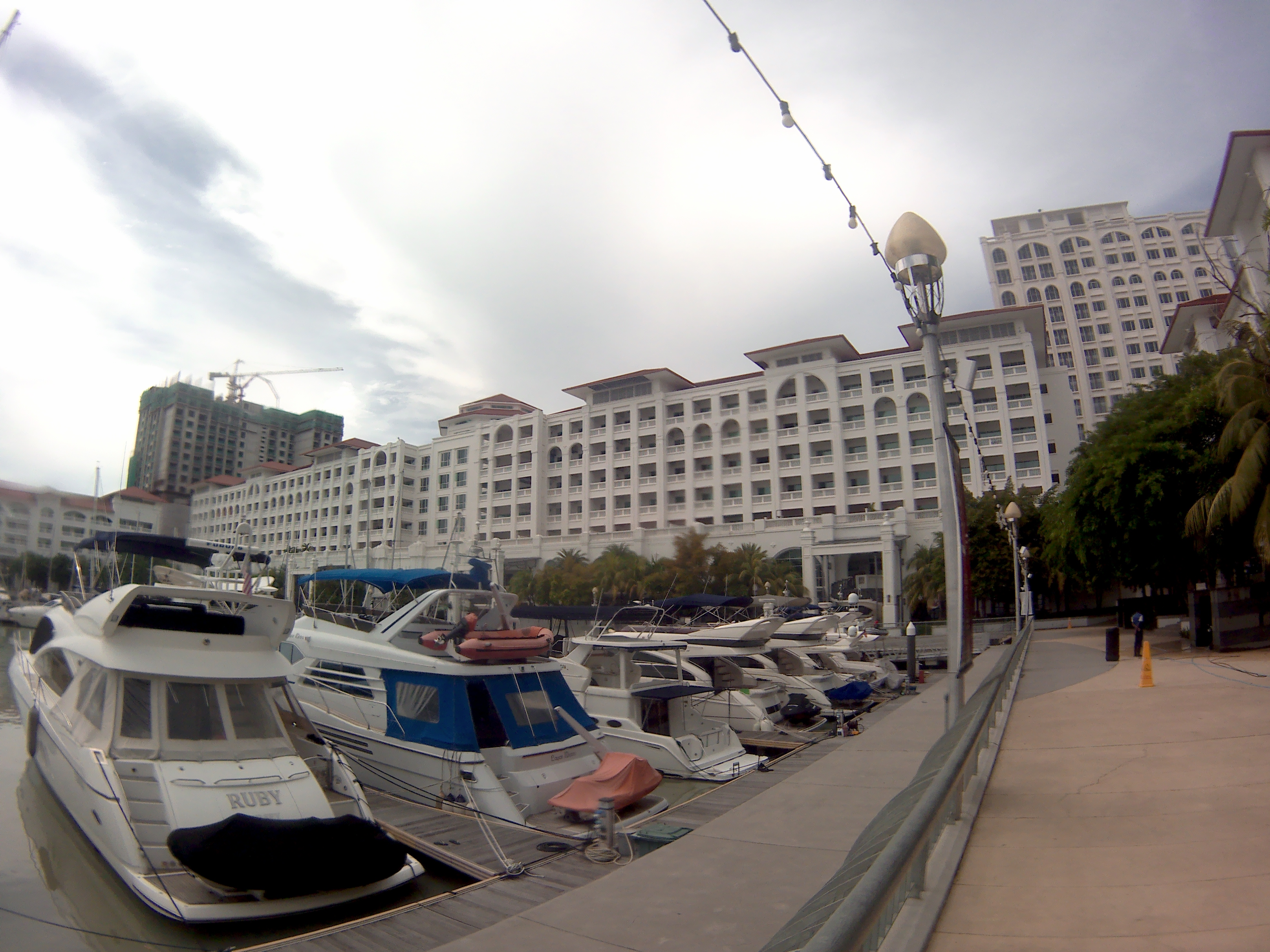 海峡岸广场码头